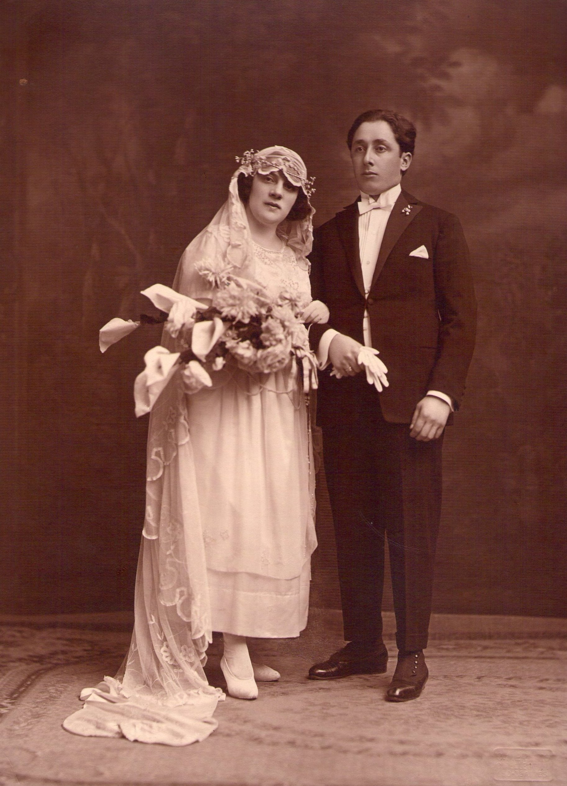 Foto de la ceremonia nupcial de Germán Leonetti con Filomena Fabiano -año 1922